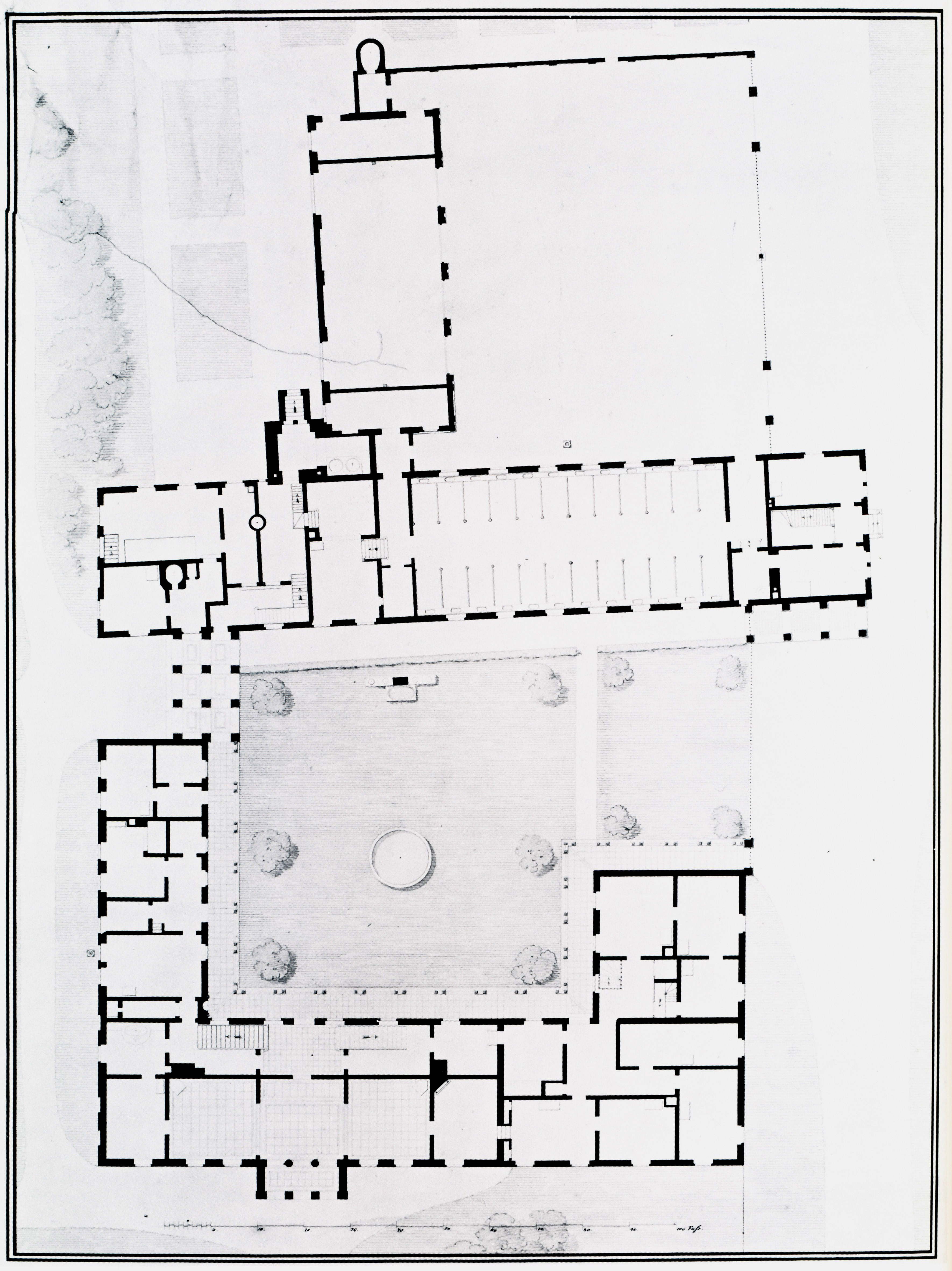 Der Grundriss des Schlosses Glienicke, Persius nach Schinkel 1832